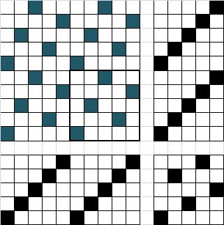 Atlasskanga rakendus